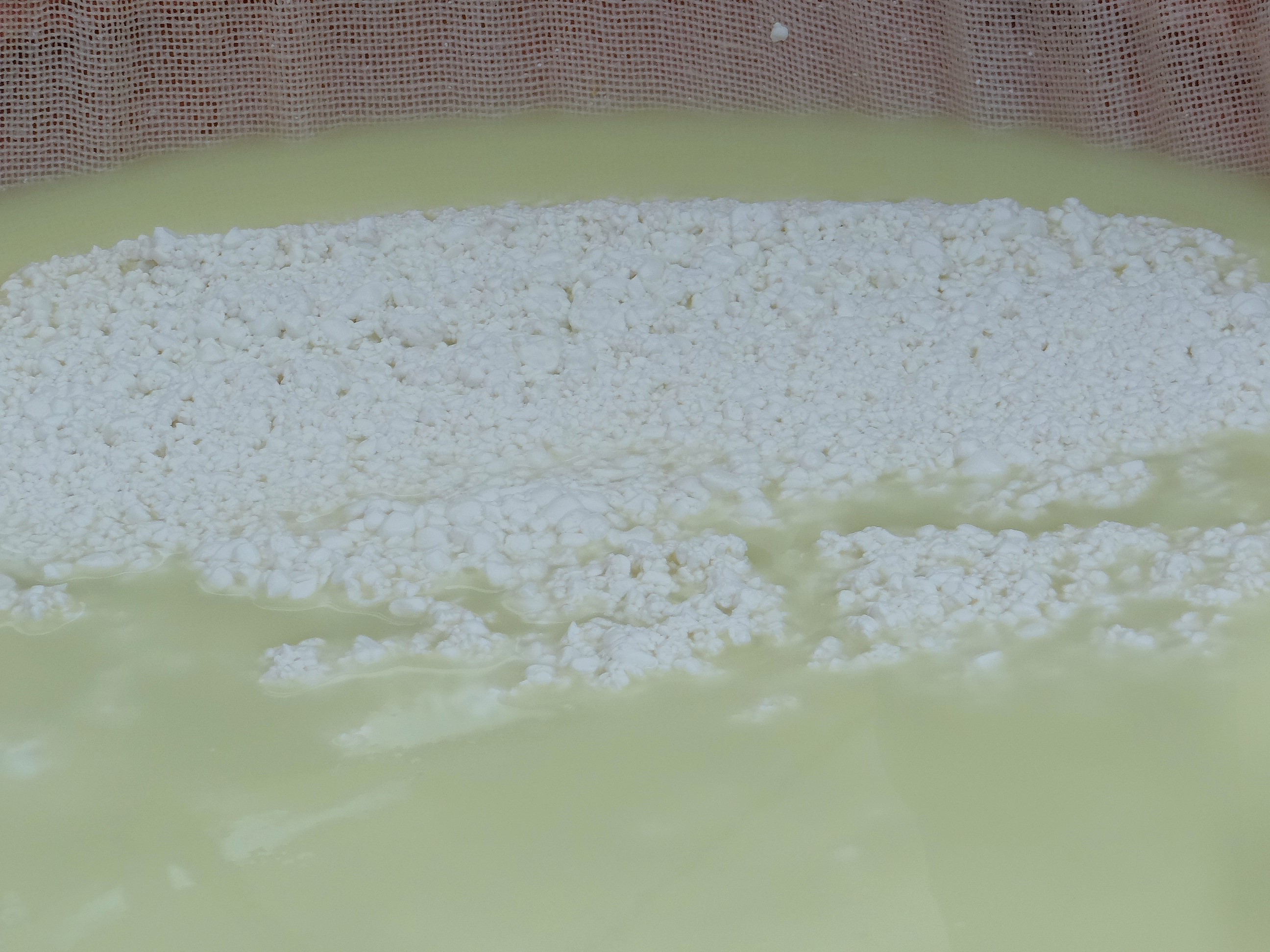 Fabrication du fromage de chèvre par Monsieur Sylvain Chevassu lors de la fête de l'Alpe et des Guides de Pralognan-la-Vanoise